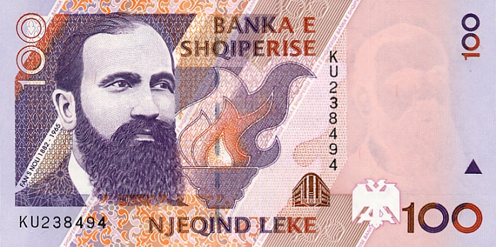 100 leke